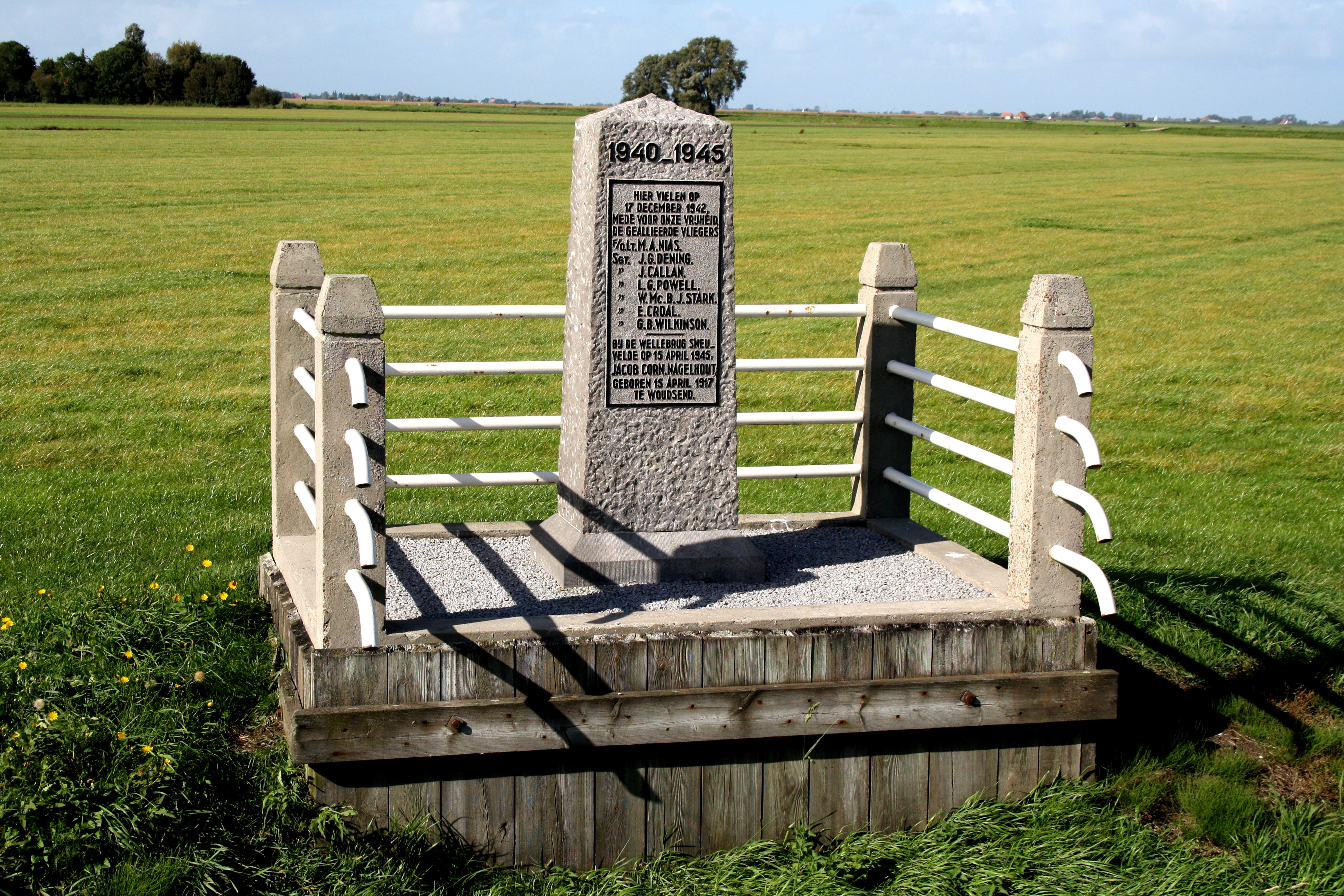 Monument Ypecolsga - 17 december 1942